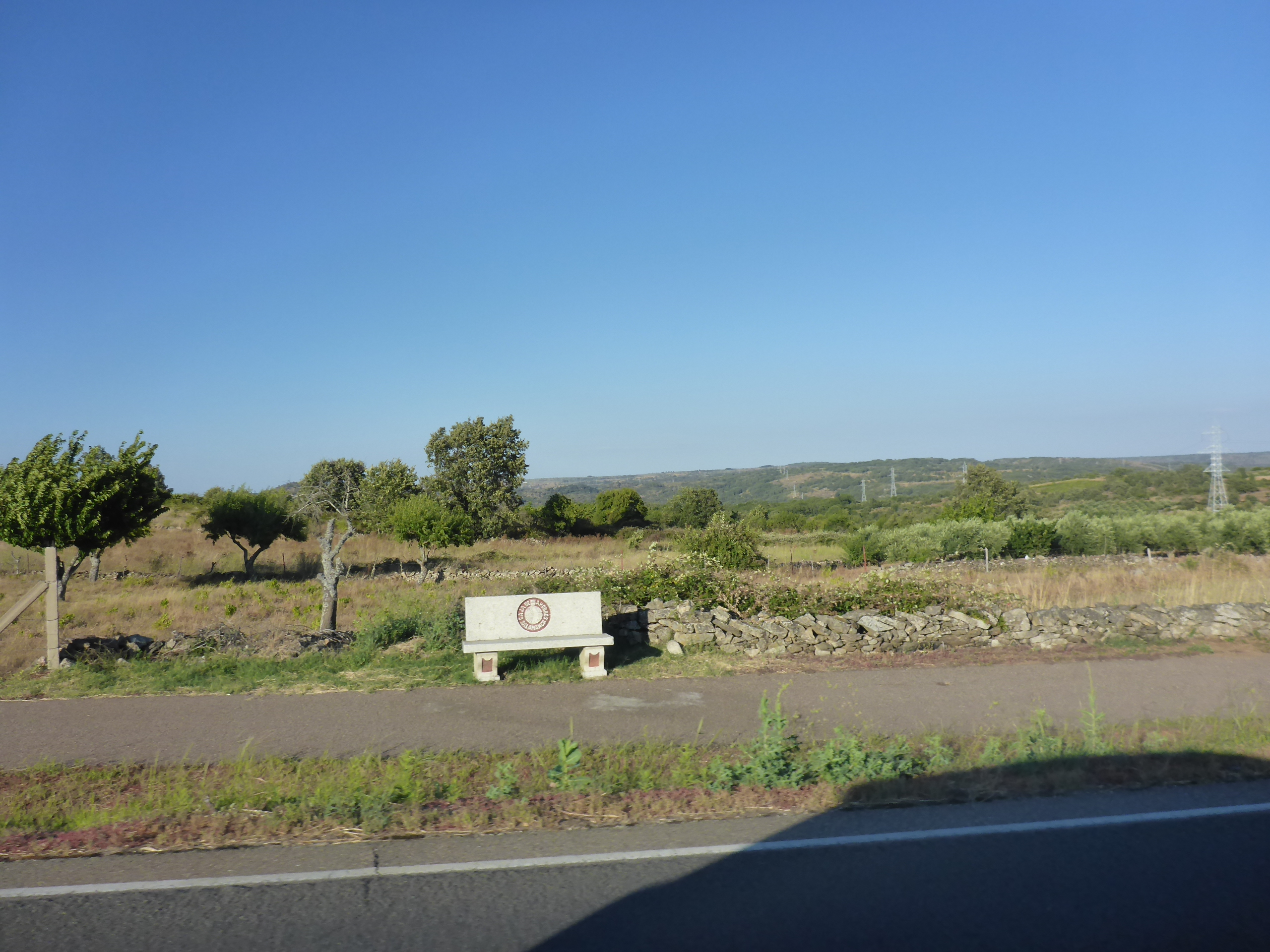 Banco de Caja de Ahorros de Salamanca (Masueco España)